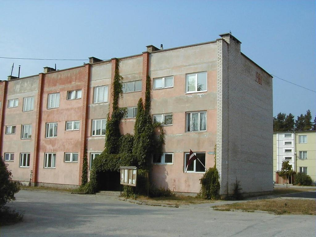 Naudītes pagastnams 2002-09-07